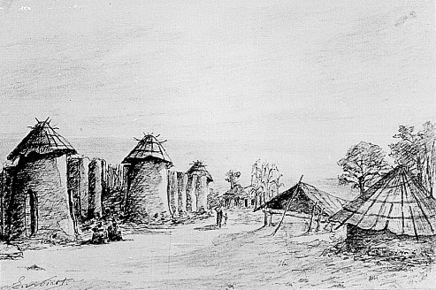 Le tata de Bademba à Kédougou, Sénégal (Voyages du docteur Jean-Marie Baol au Sénégal, au Soudan et dans la Haute-Guinée). Don de Bayol en 1883.